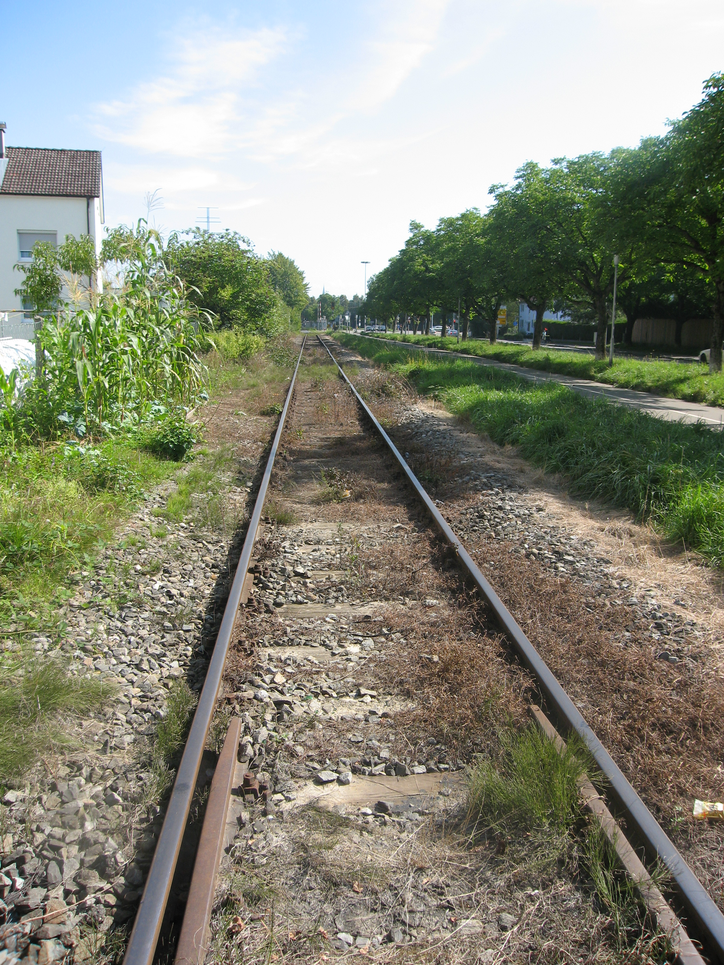 Gleis der Teuringertal-Bahn in Friedrichshafen (Nähe Bodenseecenter, Blickrichtung Südost). Heute werden die Gleise nur noch als Industriegleise gebraucht.